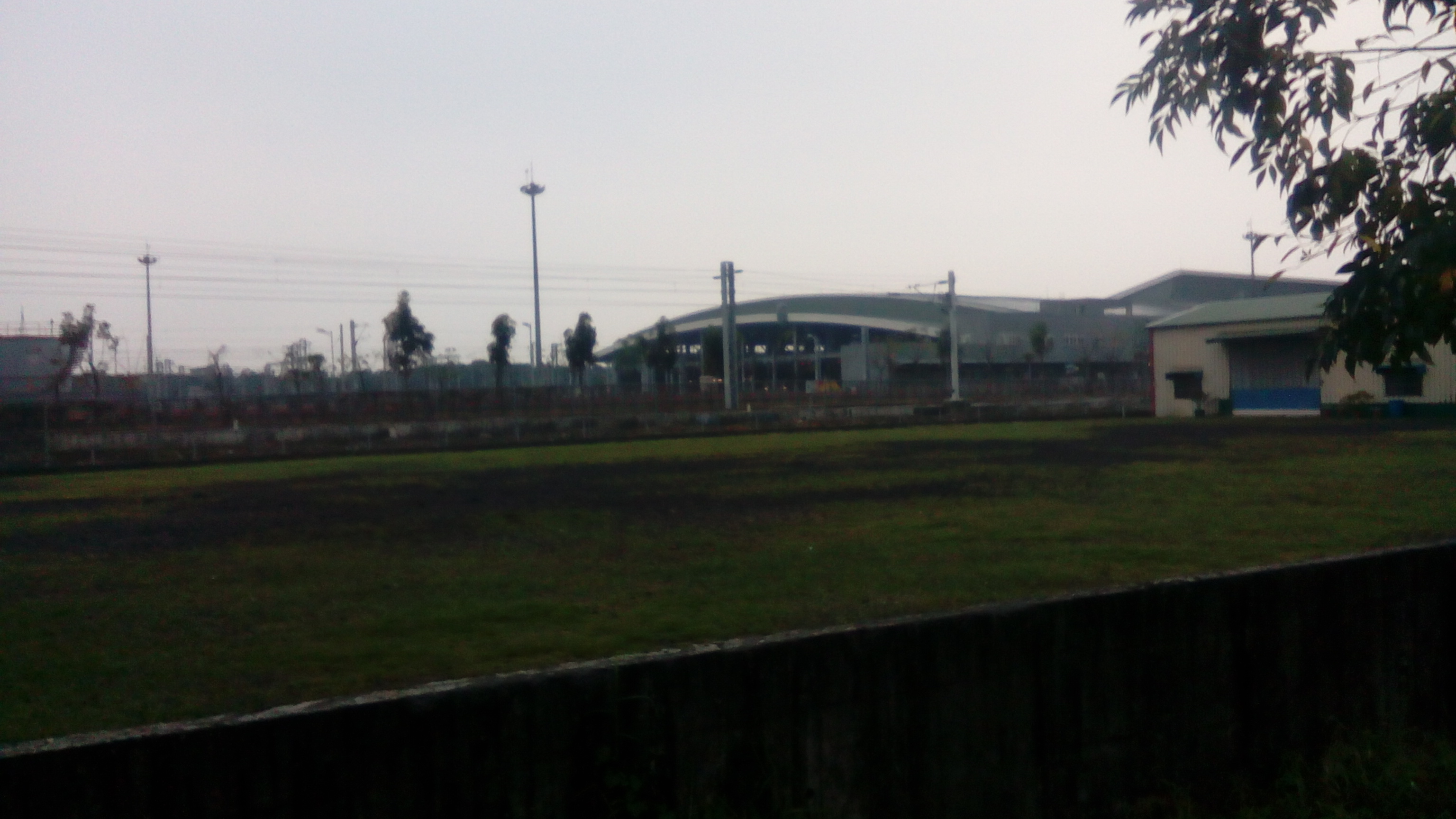 中文（台灣）: 臺灣鐵路管理局潮州車輛基地